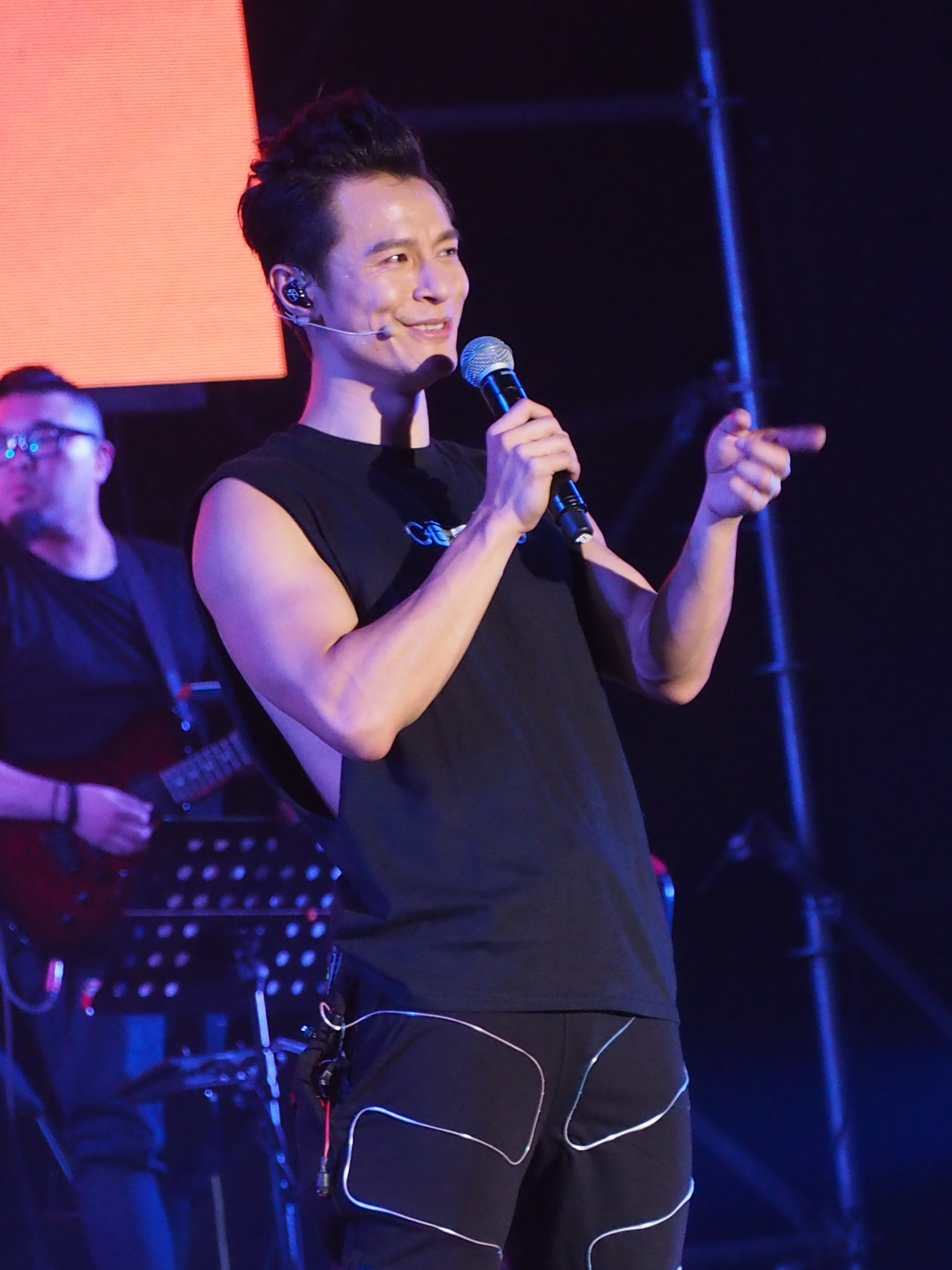 On仔 @ C AllStar 2016 C AllStar 廣州天梯演唱會